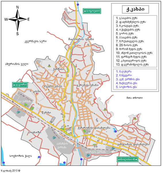 ქალაქ კასპის რუკა